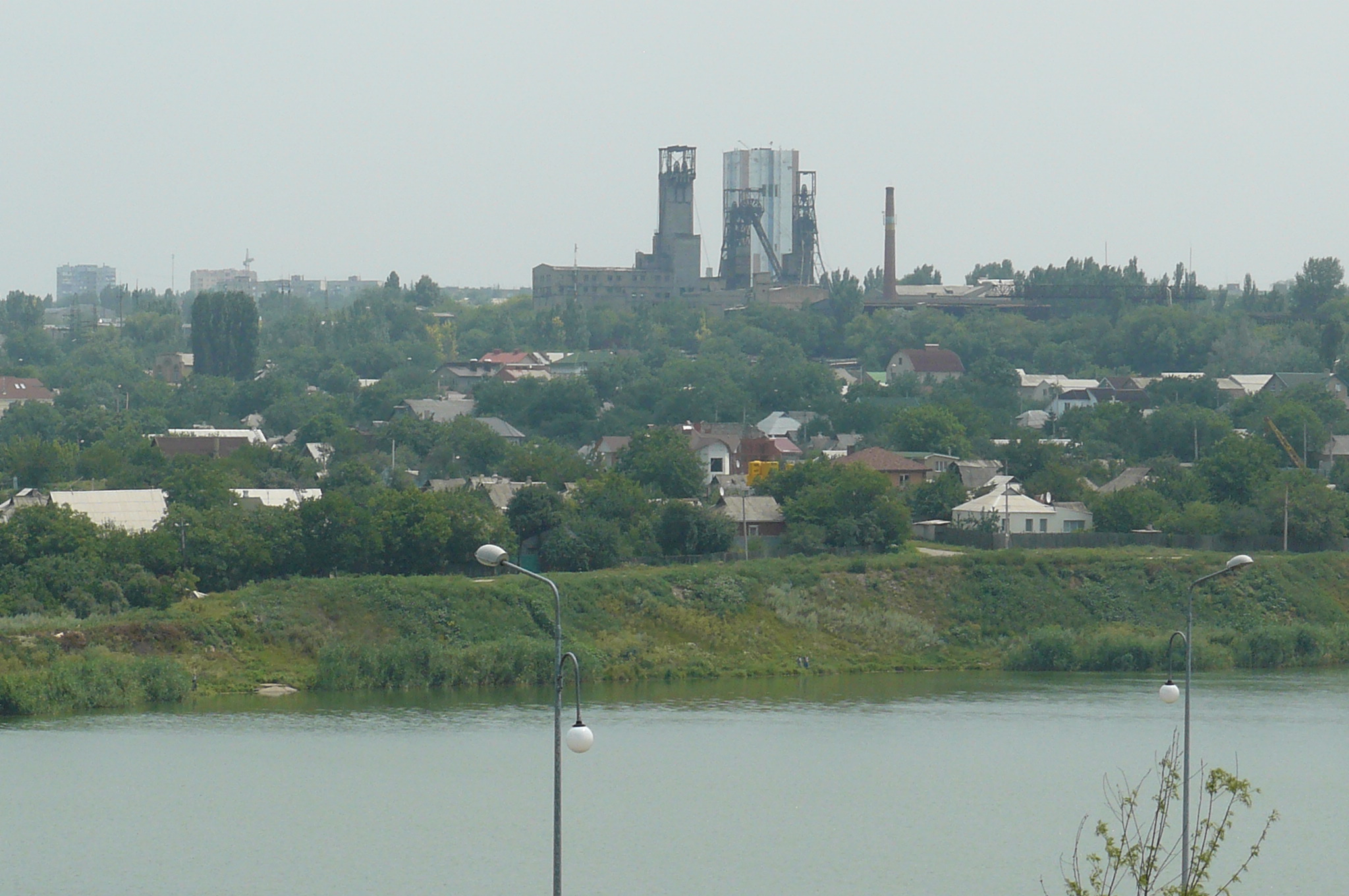 Musical Park in Donetsk.